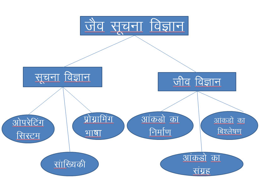 Bioinformatics-model